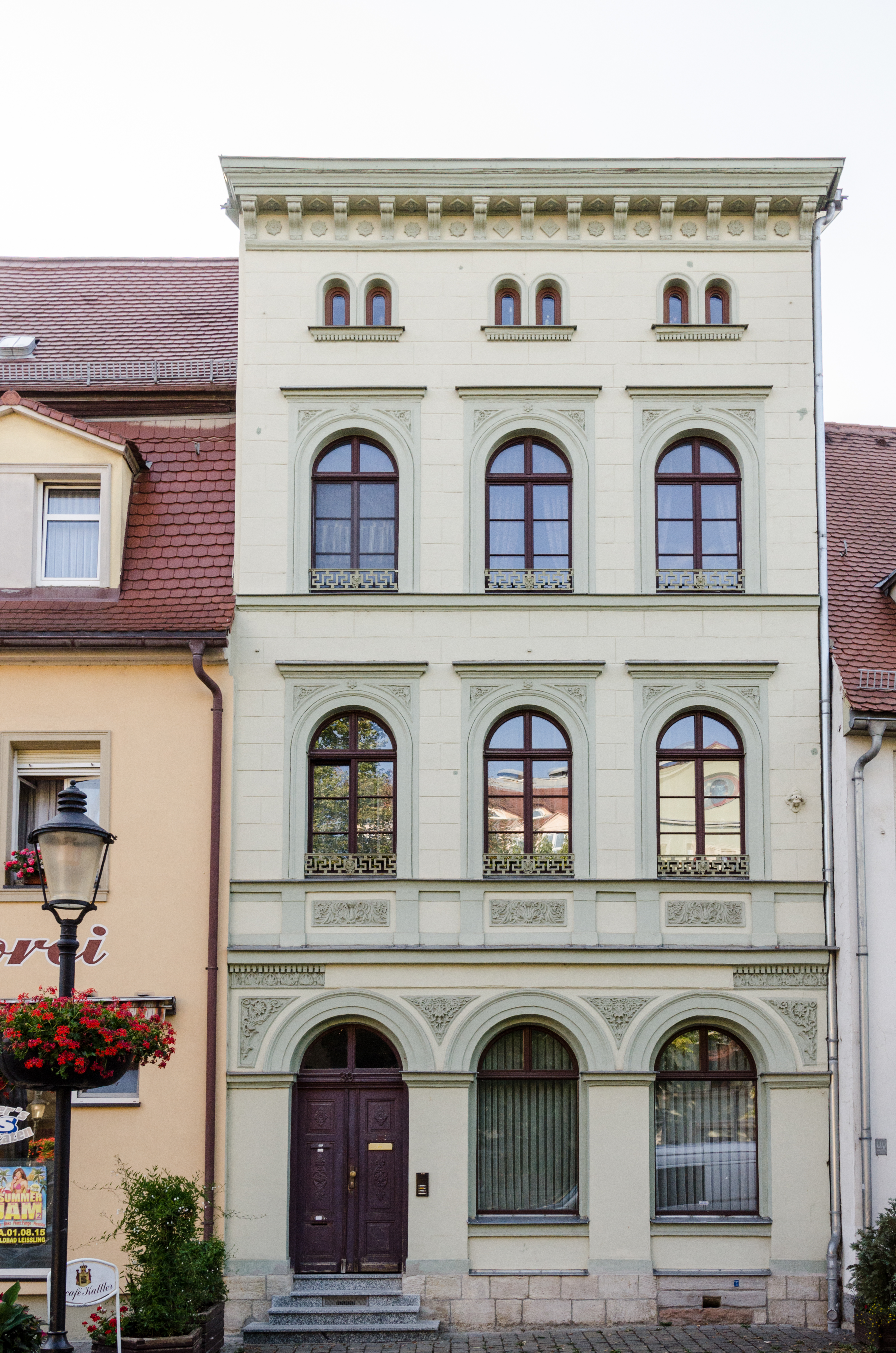 Naumburg, Lindenring 39